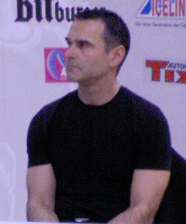 Dirk Bauermann, German basketball coach